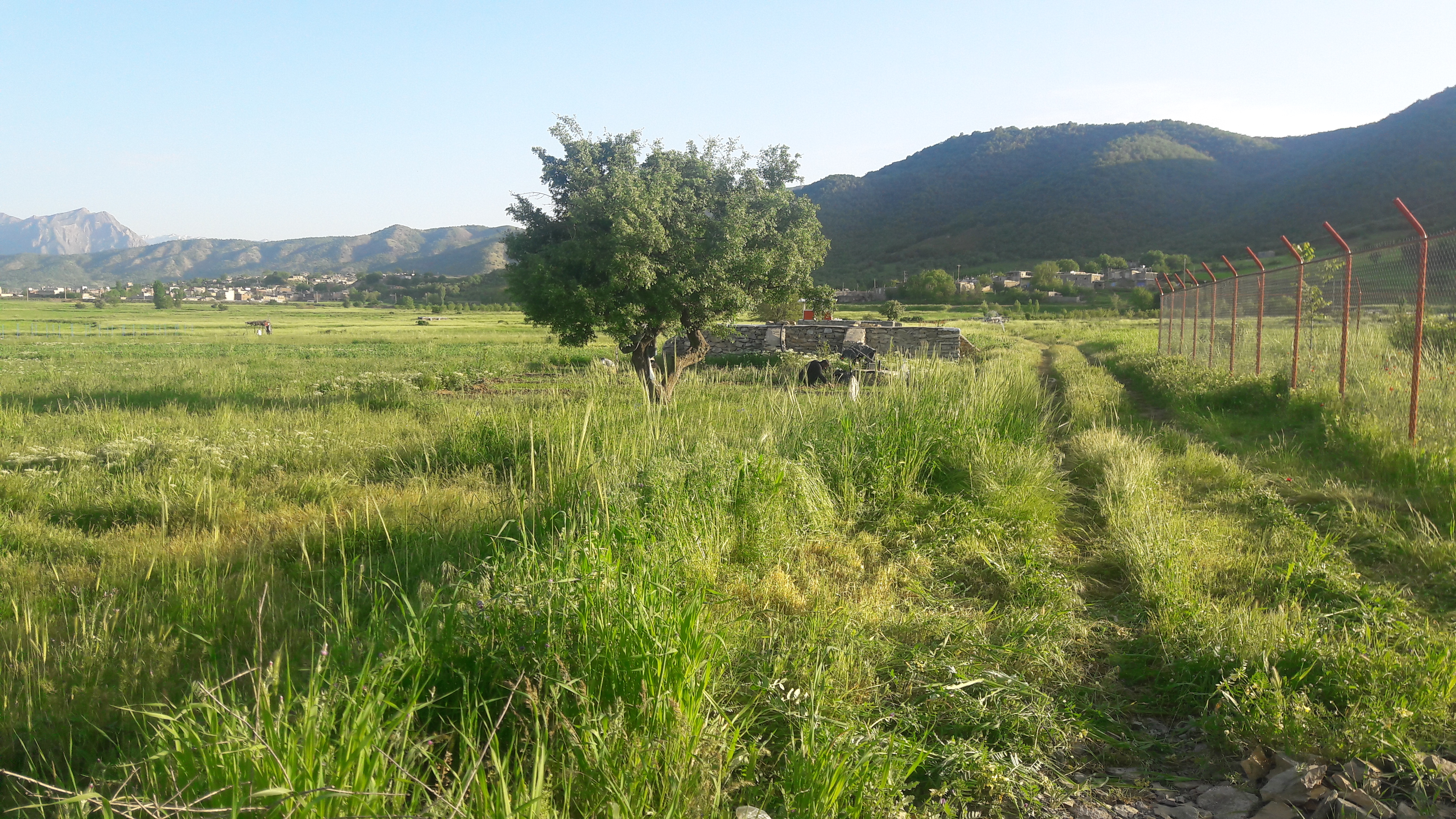 بهار